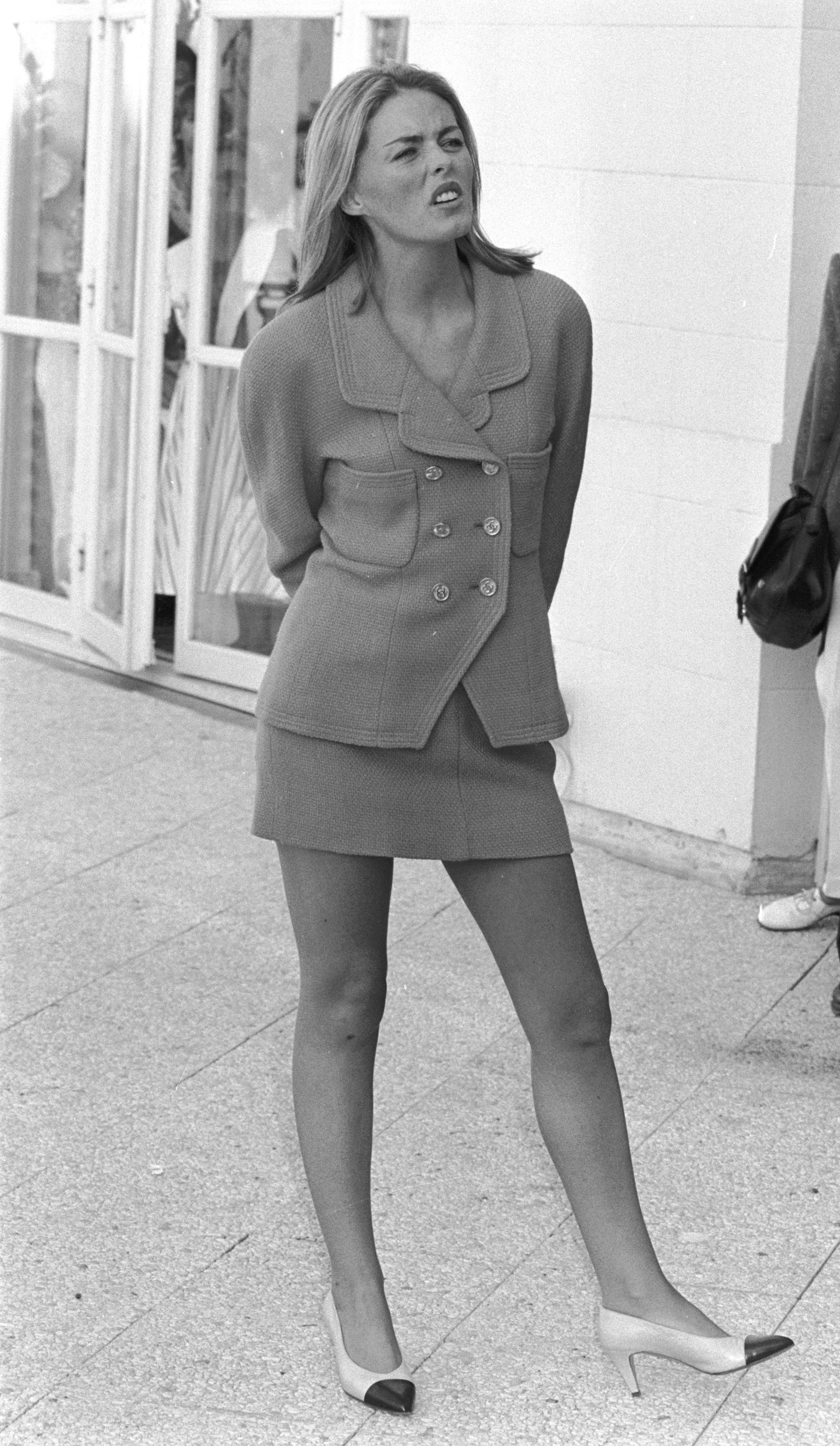 L'actrice britannique Patsy Kensit au Festival du cinéma américain de Deauville (Normandie, France) en 1991.